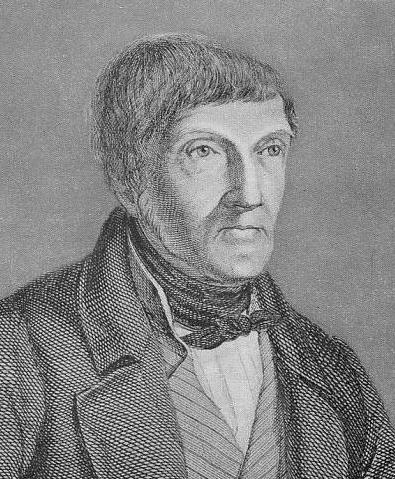 Friedrich Creuzer (1771–1858), deutscher klassischer Philologe. Stich in seinen Deutschen Schriften, Band VII.